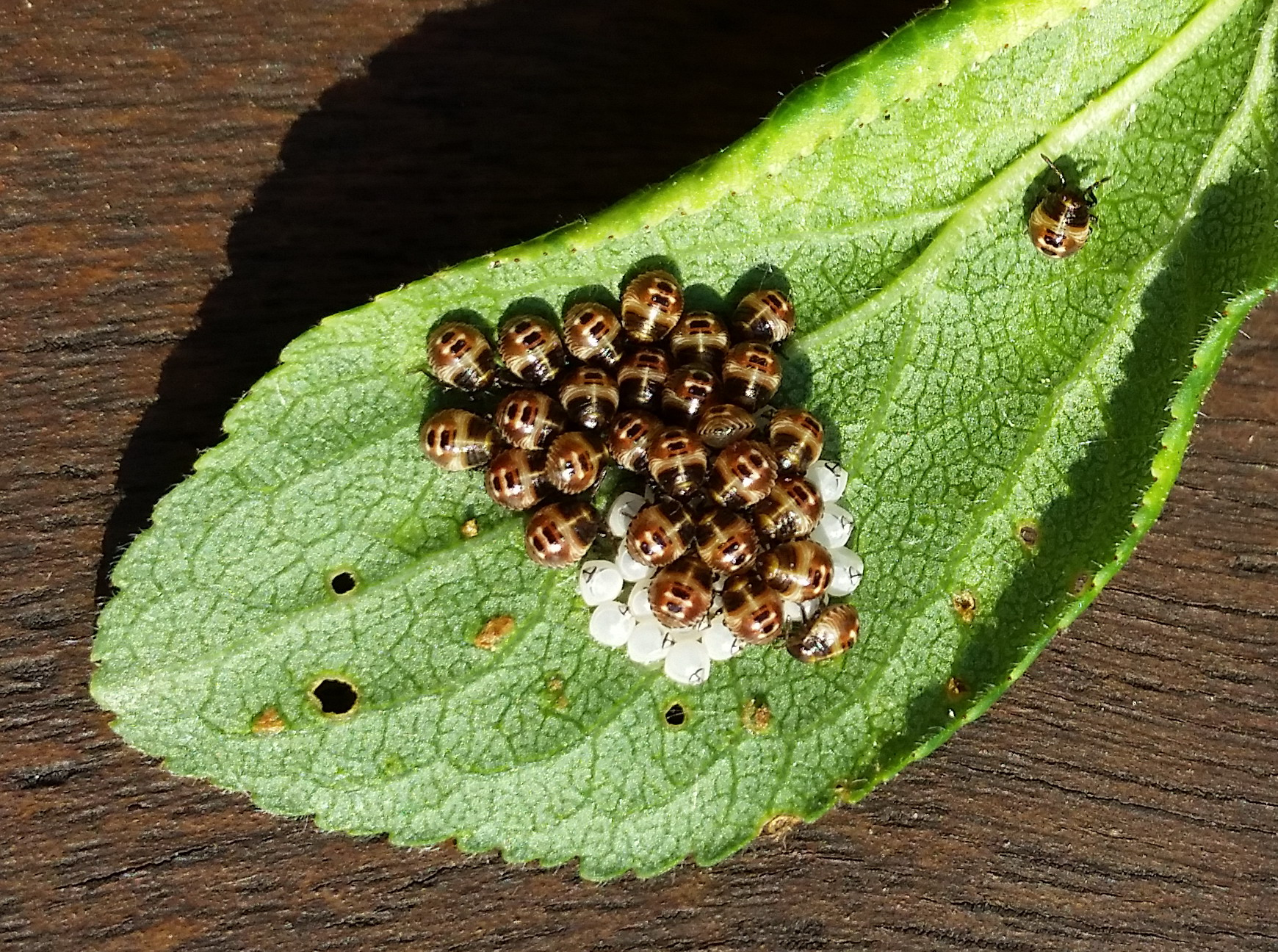 Eier und Nymphen einer Baumwanzenart der Gattung "Palomena"